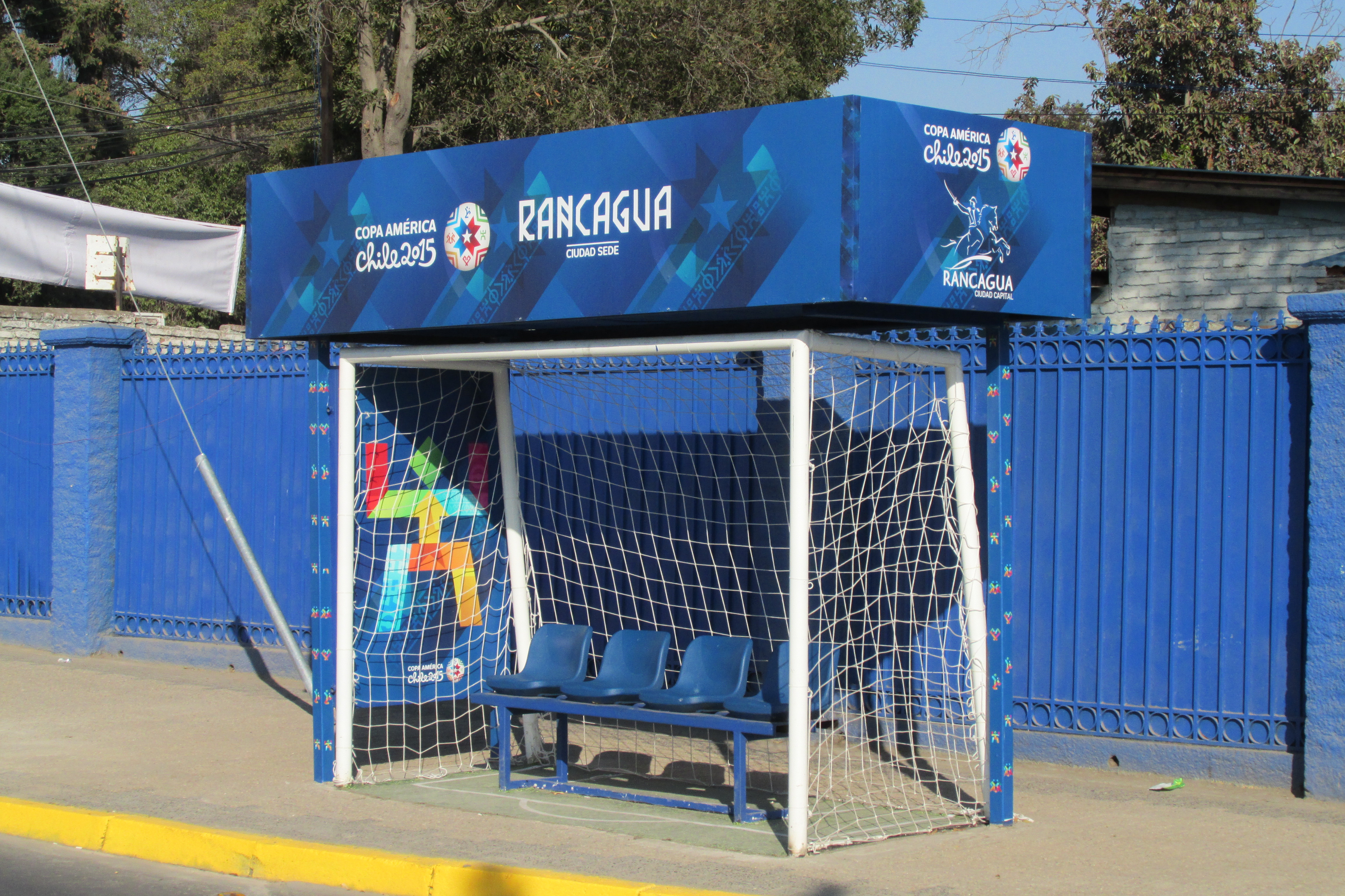 Paradero locomoción colectiva con forma de arco de futbol, construido para Copa América Chile 2015, en Carretera el Cobre, contiguo a Estadio El Teniente, comuna de Rancagua